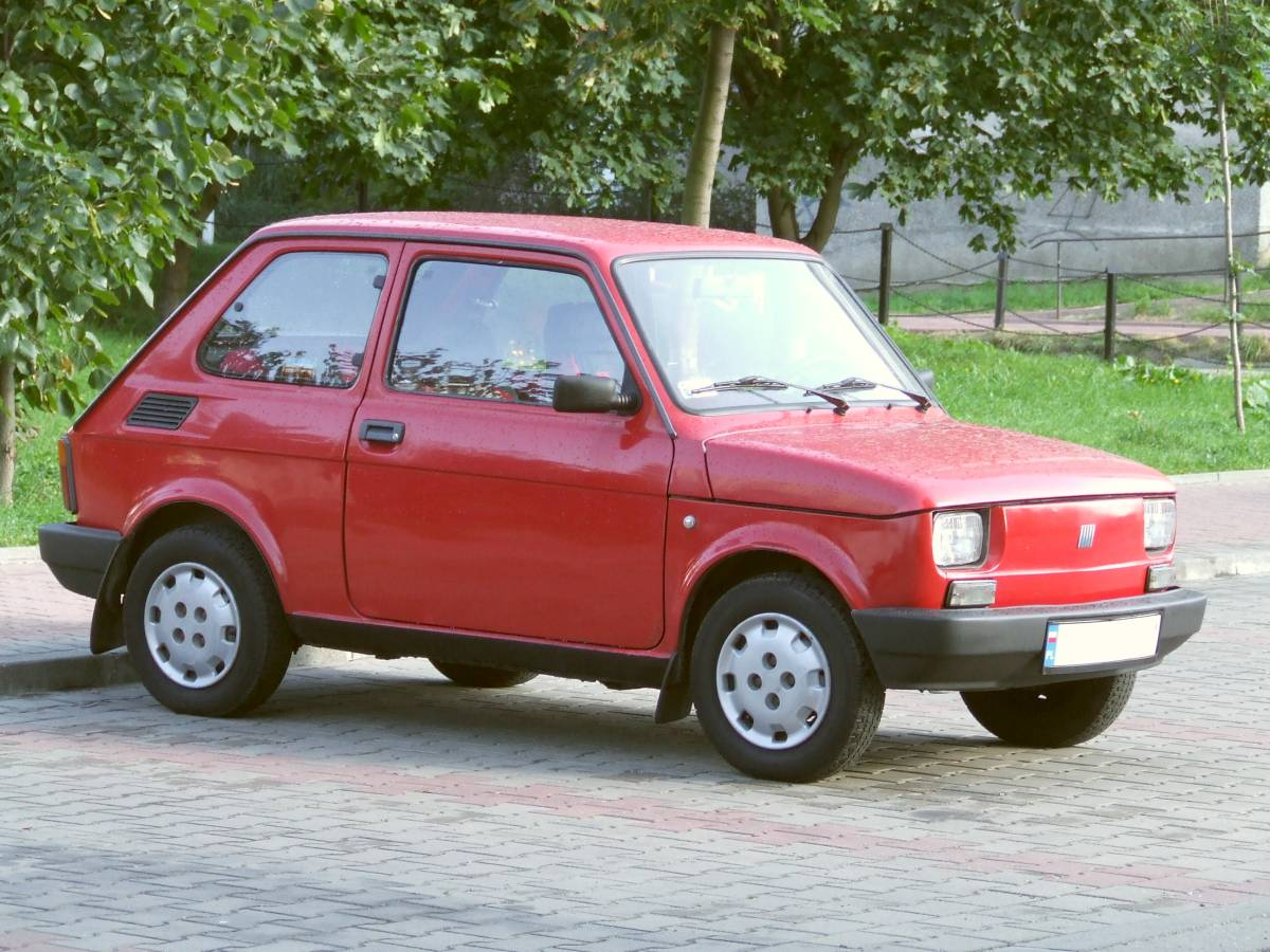 Polski Fiat 126p. Z przodu znak fabryczny Fiat. Wyprodukowany przez Fiat Auto Poland.